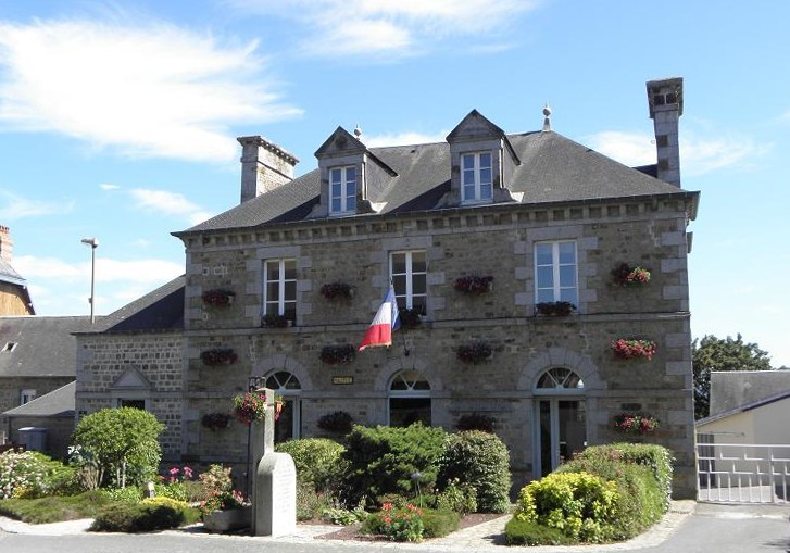 Mairie de Saint-Quentin-sur-le-Homme (50).